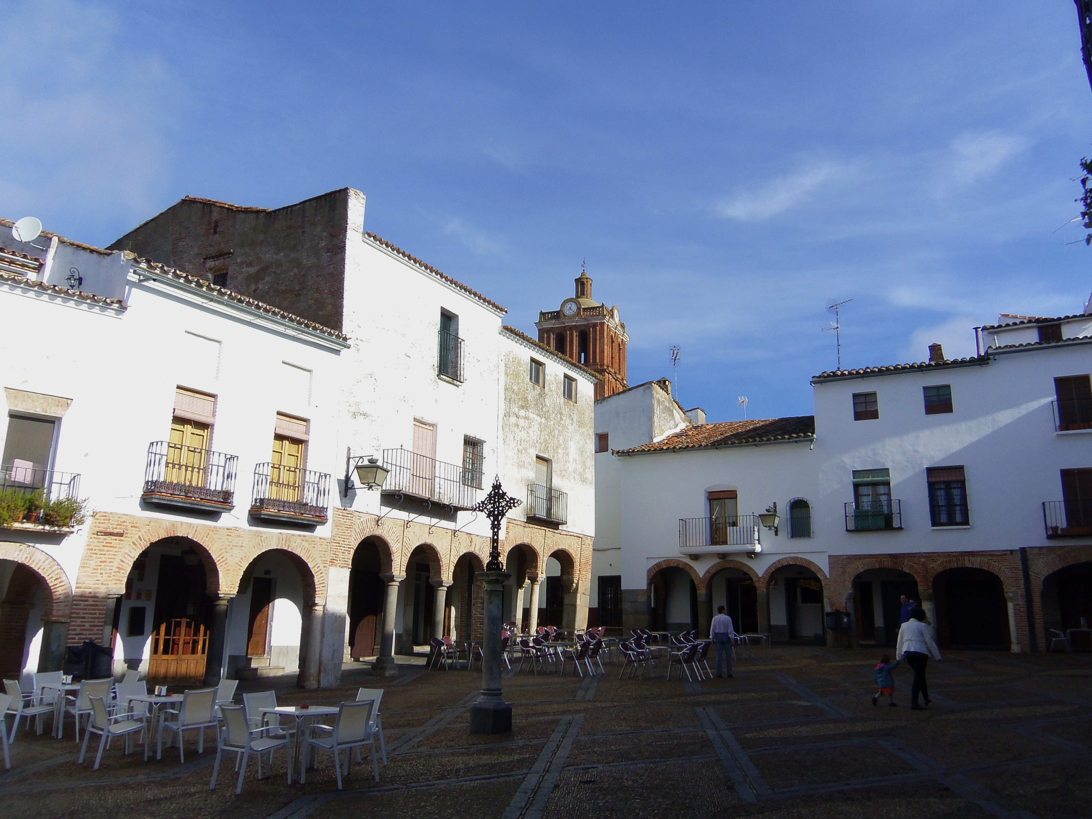 La Plaza Chica de Zafra es la más pequeña y antigua de los dos plazas porticadas de la ciudad de Zafra, la otra es la Plaza Grande.